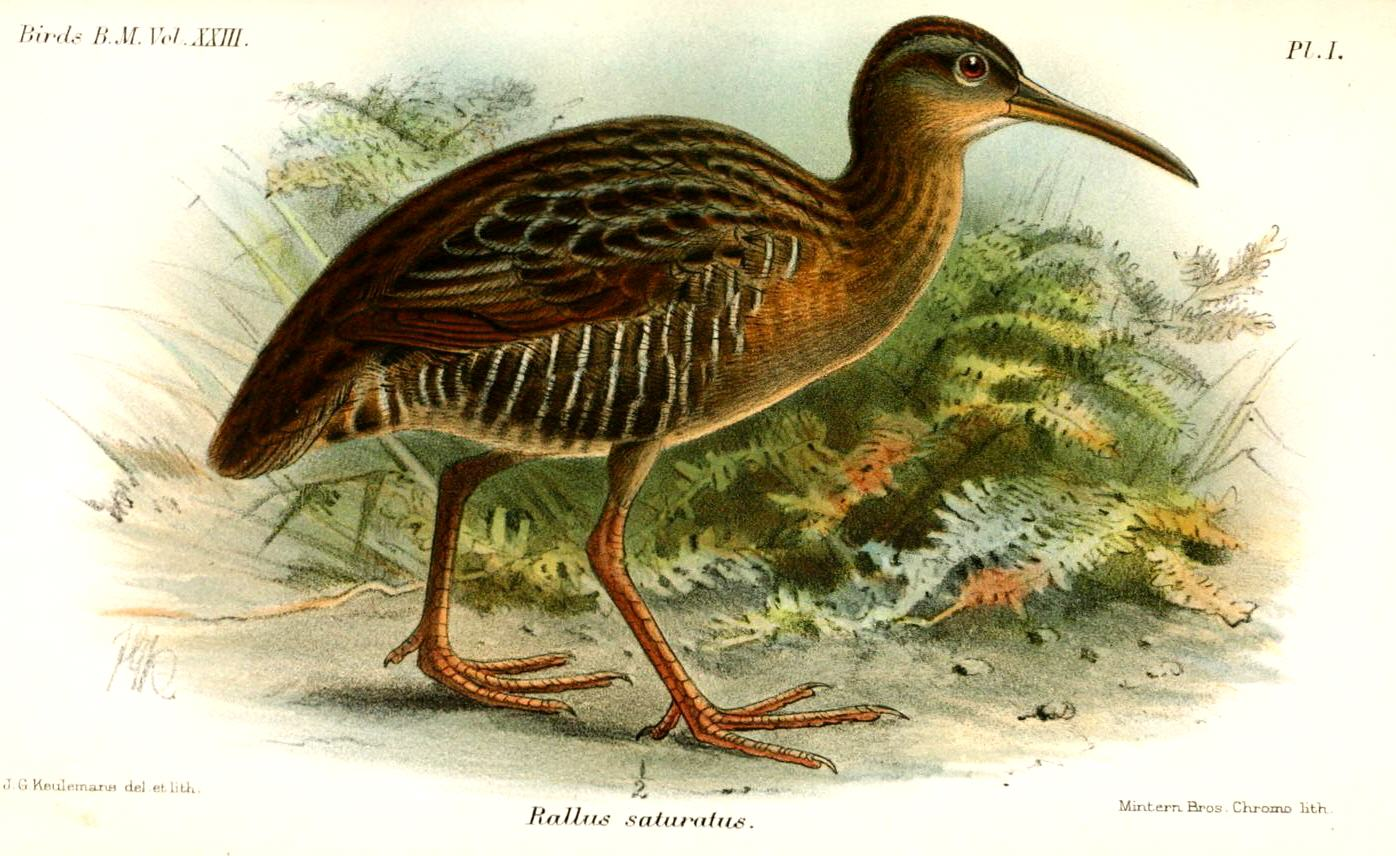 Rallus saturatus = Rallus crepitans saturatus, Clapper Rail ssp.